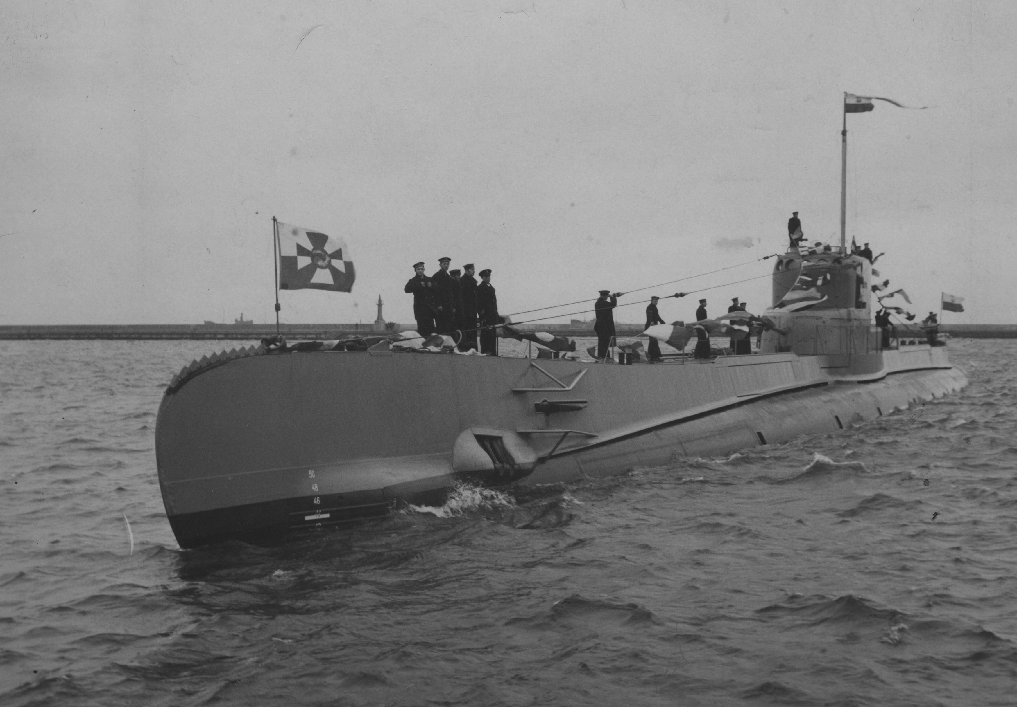 Powitanie ORP Orzeł w Gdyni.